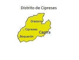 Mapa Cipreses